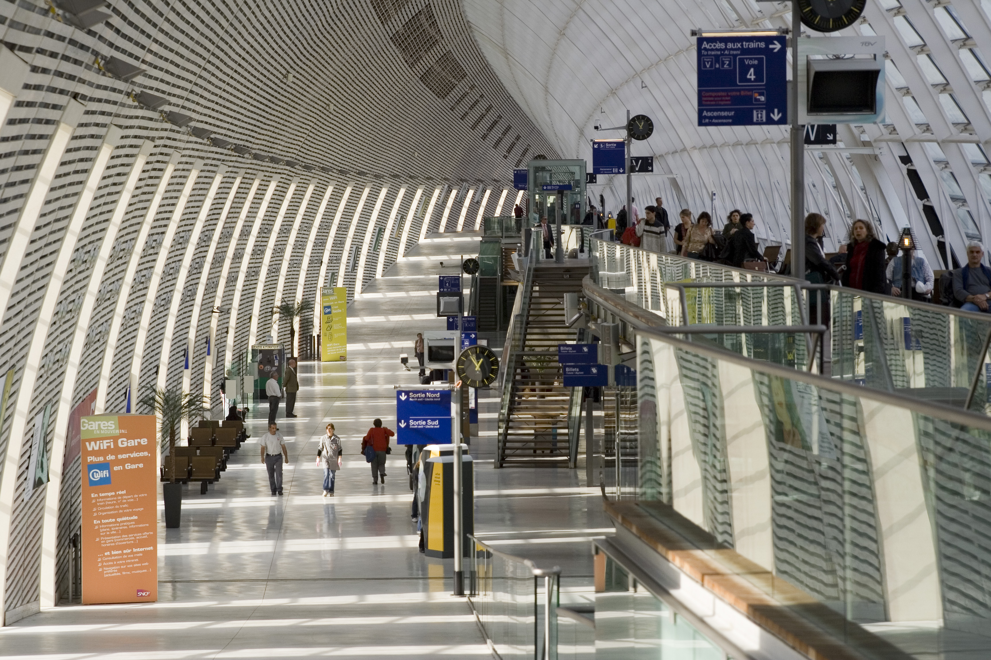 Avignon TGV station